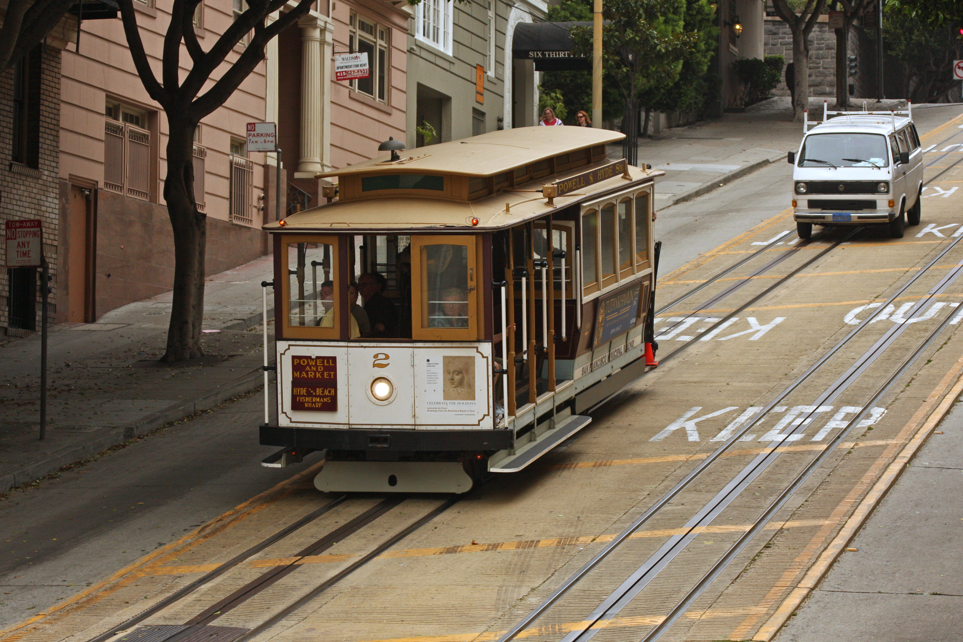 San Francisco Cable Car 22